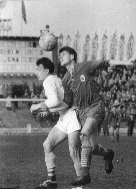 Zentralbild-Wendorf Wen-Uh 9.11.58 4:0 für den ASK Vorwärts-Berlin - Mit dem 4:0-Sieg des ASK Vorwärts über den SC Motor Jena am 9.11.58 im Berliner Jahn-Stadion ist der ASK jetzt schon Deutscher Fußballmeister. UBz.: Kopfballduell zwischen Assmy (Vorwärts, links) und dem Jenaer Ahnert.